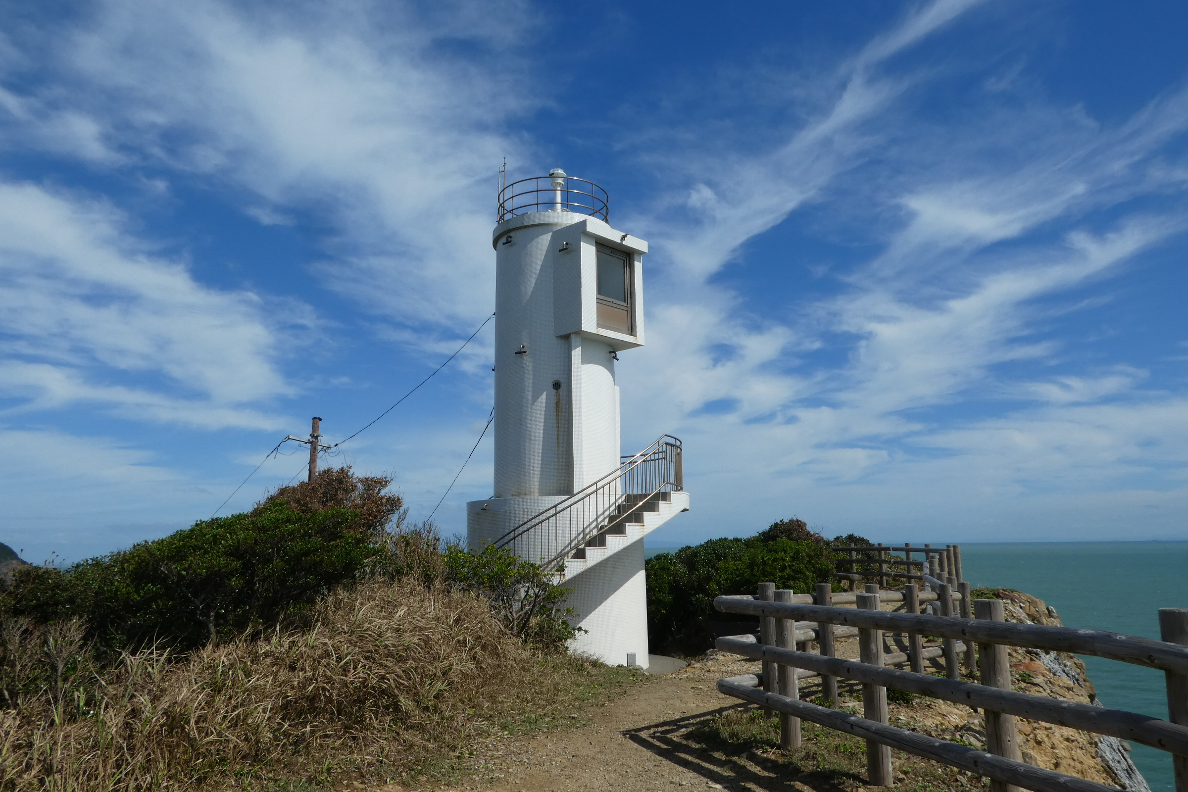 蒲生田岬灯台。徳島県阿南市椿町蒲生田岬。